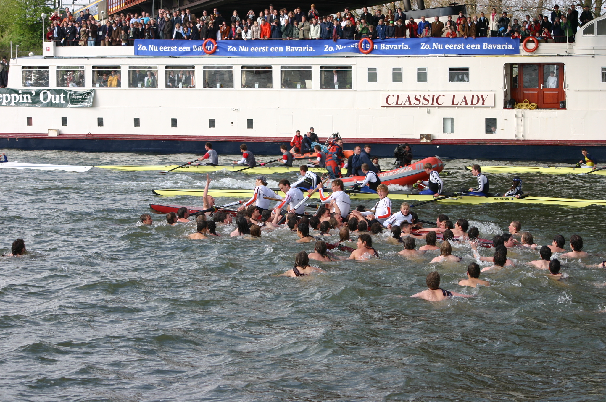 Nereus wint de 122ste Varsity te Houten. Categorie:Wikipedia:Afbeeldingen/Gebruiker:Luijt